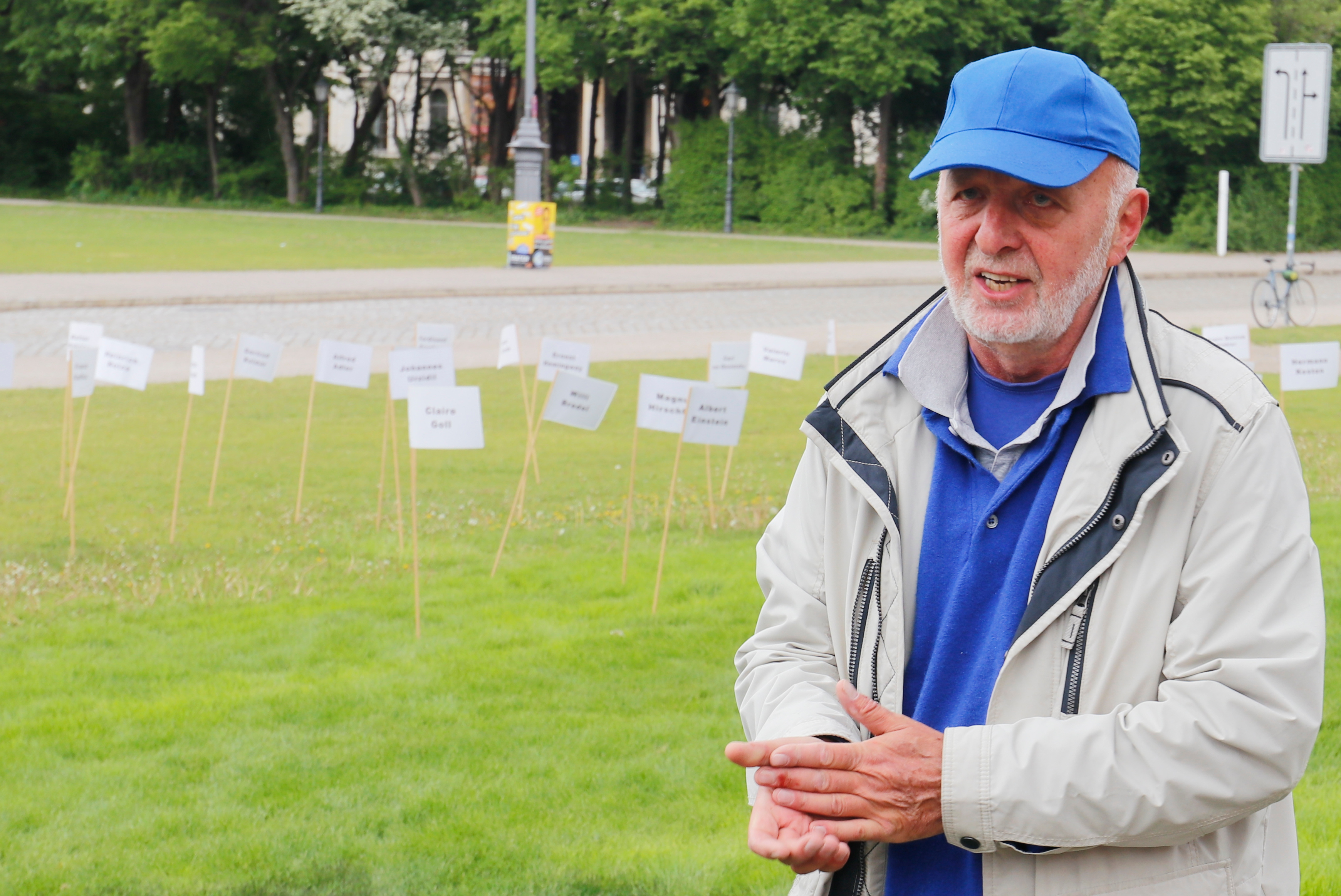 Der Münchner Aktionskünstler Wolfram Kastner erzeugt die "Brandspuren" auf dem Münchner Königsplatz, um an die Bücherverbrennung durch die Nazis am 10. Mai 1933 zu erinnern.